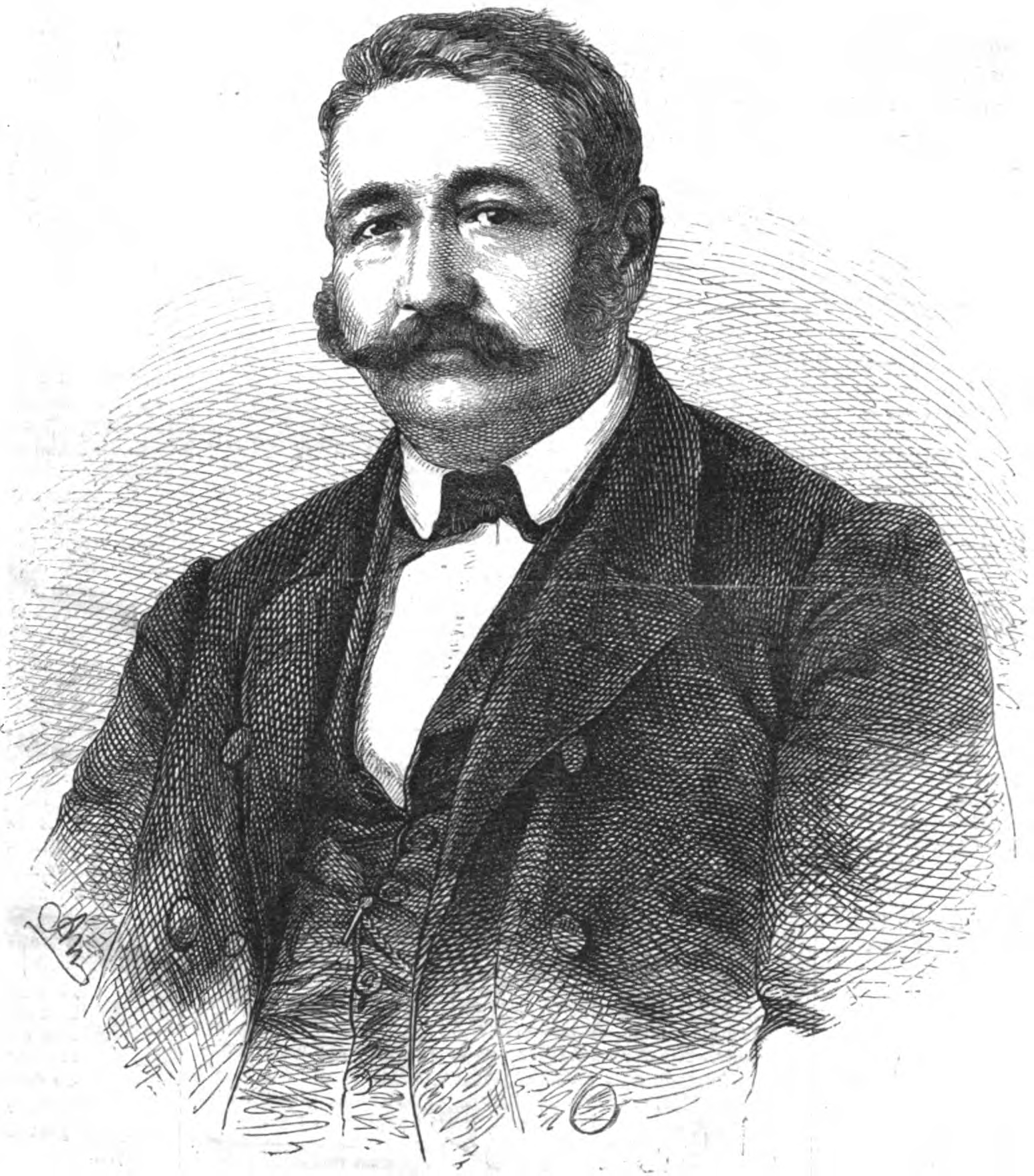 Nikolaus von Koch, bayerischer Minister im 19. Jh.